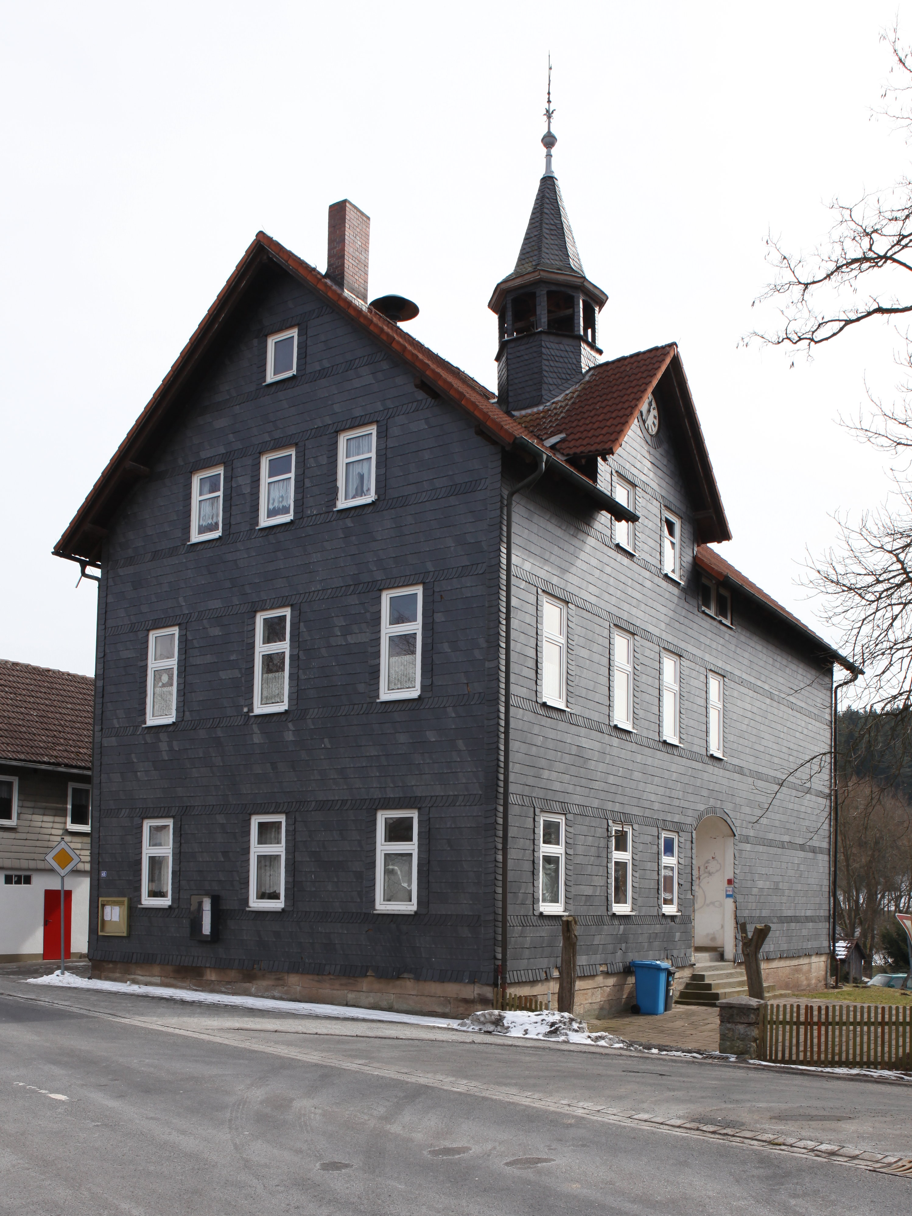 Ehemalige Schule in Goßmannsrod, OT von Veilsdorf, Landkreis Hildburghausen